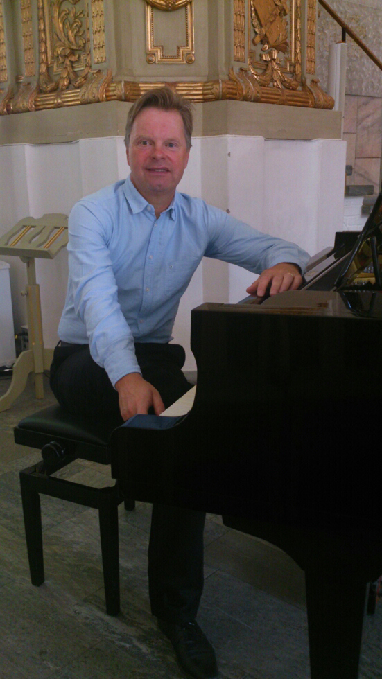 Staffan Krafft, född 1961, diplomorganist, bedriver återkommande konsertverksamhet.